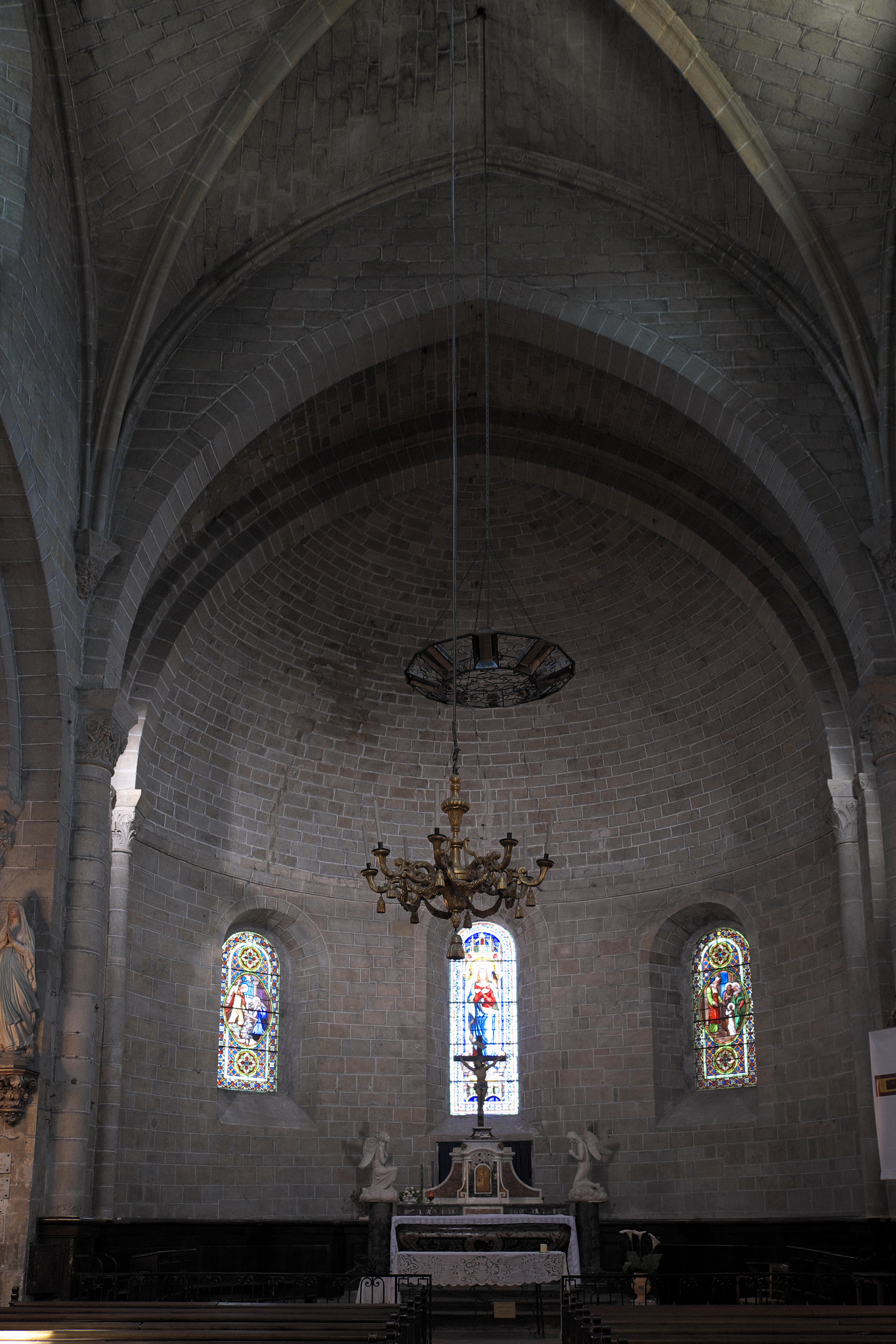 Katholische Pfarrkirche, ehemalige Abteikirche der Abtei Saint-Hilaire in Saint-Hilaire im Département Aude (Region Languedoc-Roussillon/Frankreich), Chor